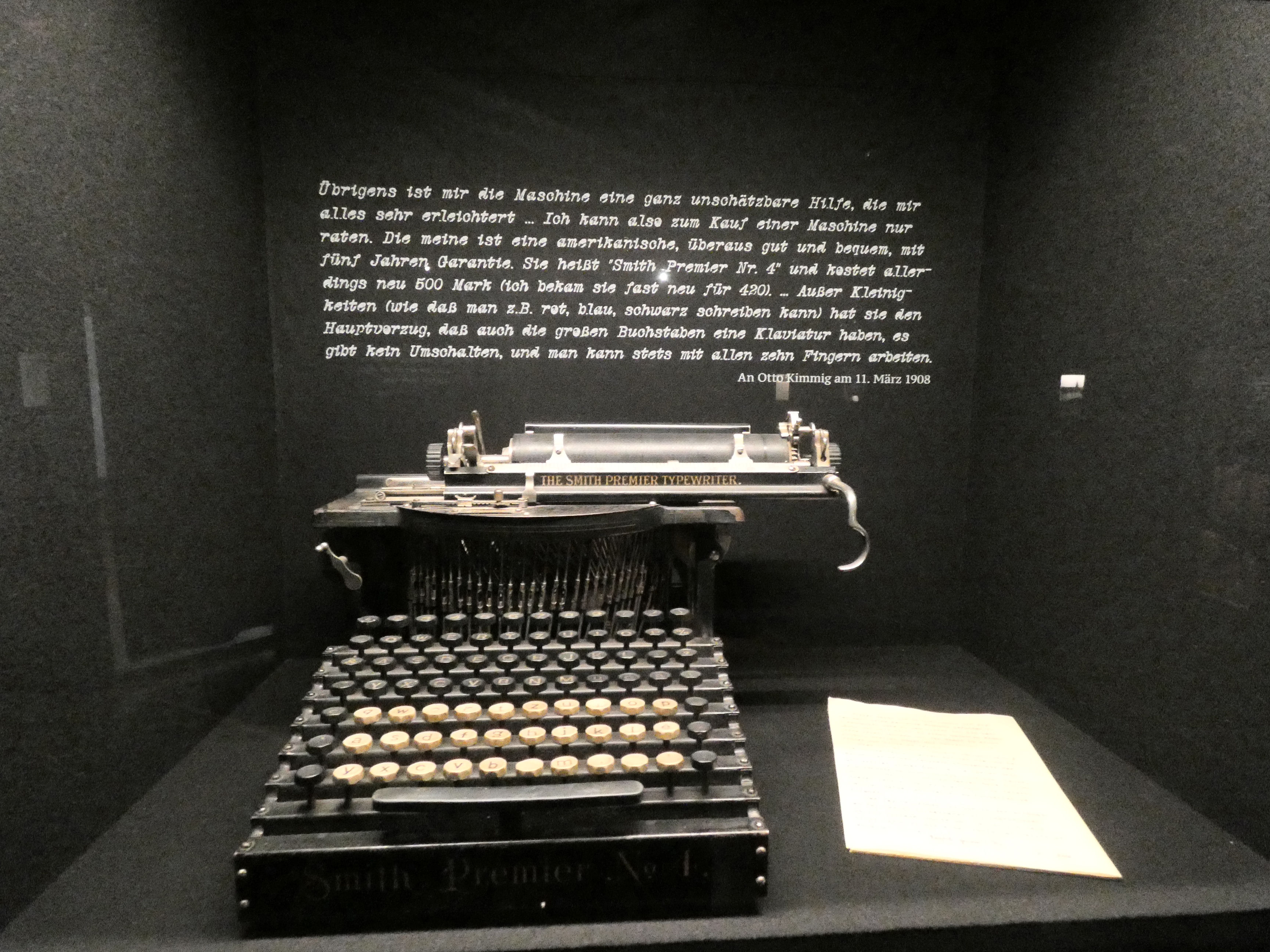 Präsentation von Hermann Hesses Schreibmaschine im Hesse Museum Gaienhofen